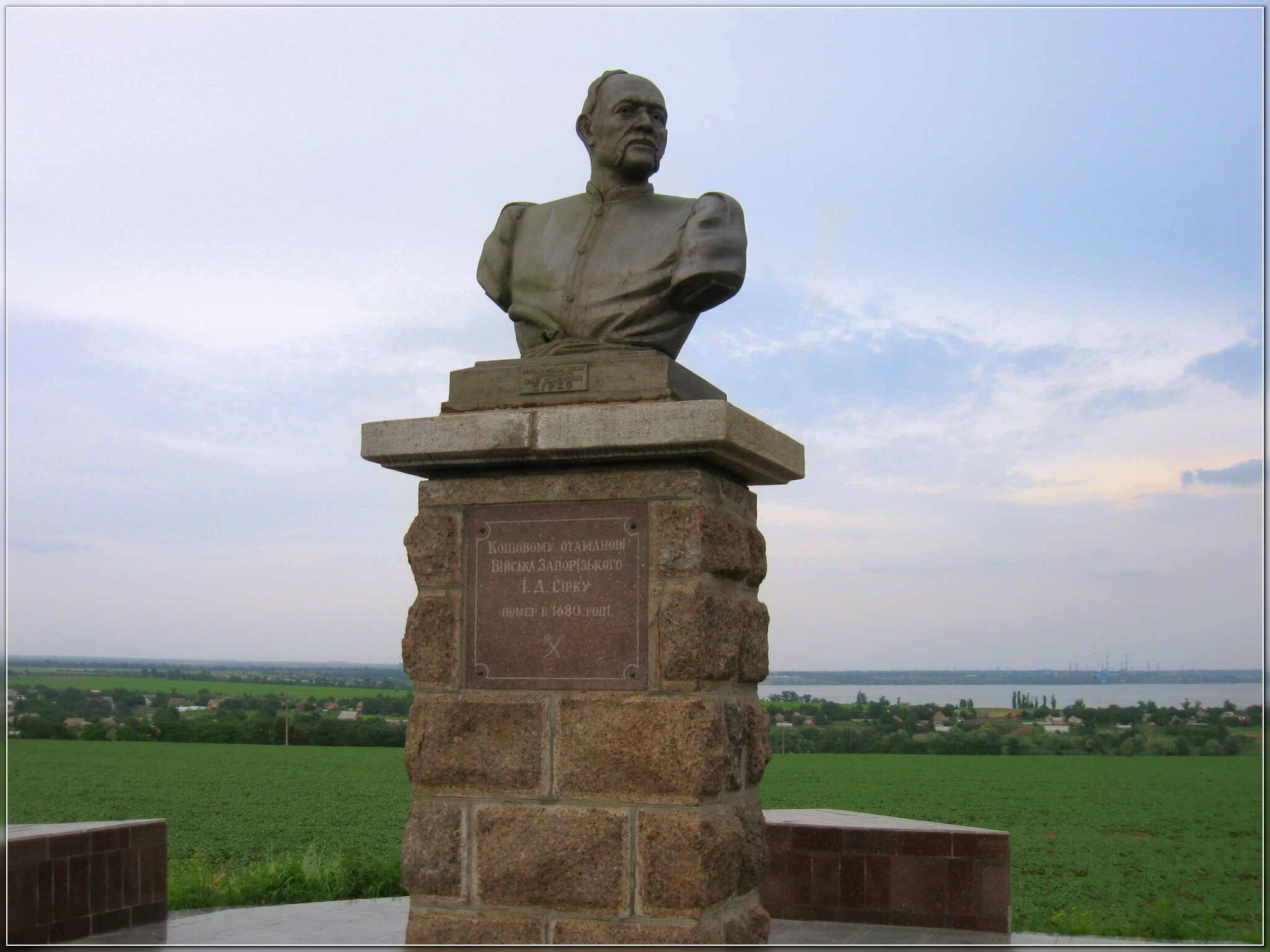 Памятник Івану Сірку — кошовому отаману Запорозької Січі й усього Війська Запорозького Низового біля села Капулівка Нікопольського району Дніпропетровської області.